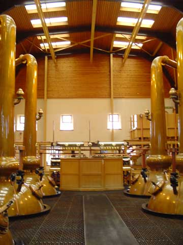 Distilleerketels bij Glen Morangie. Foto Xaphire.